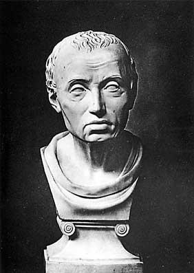 Büste von Immanuel Kant (Hamburger Exemplar)